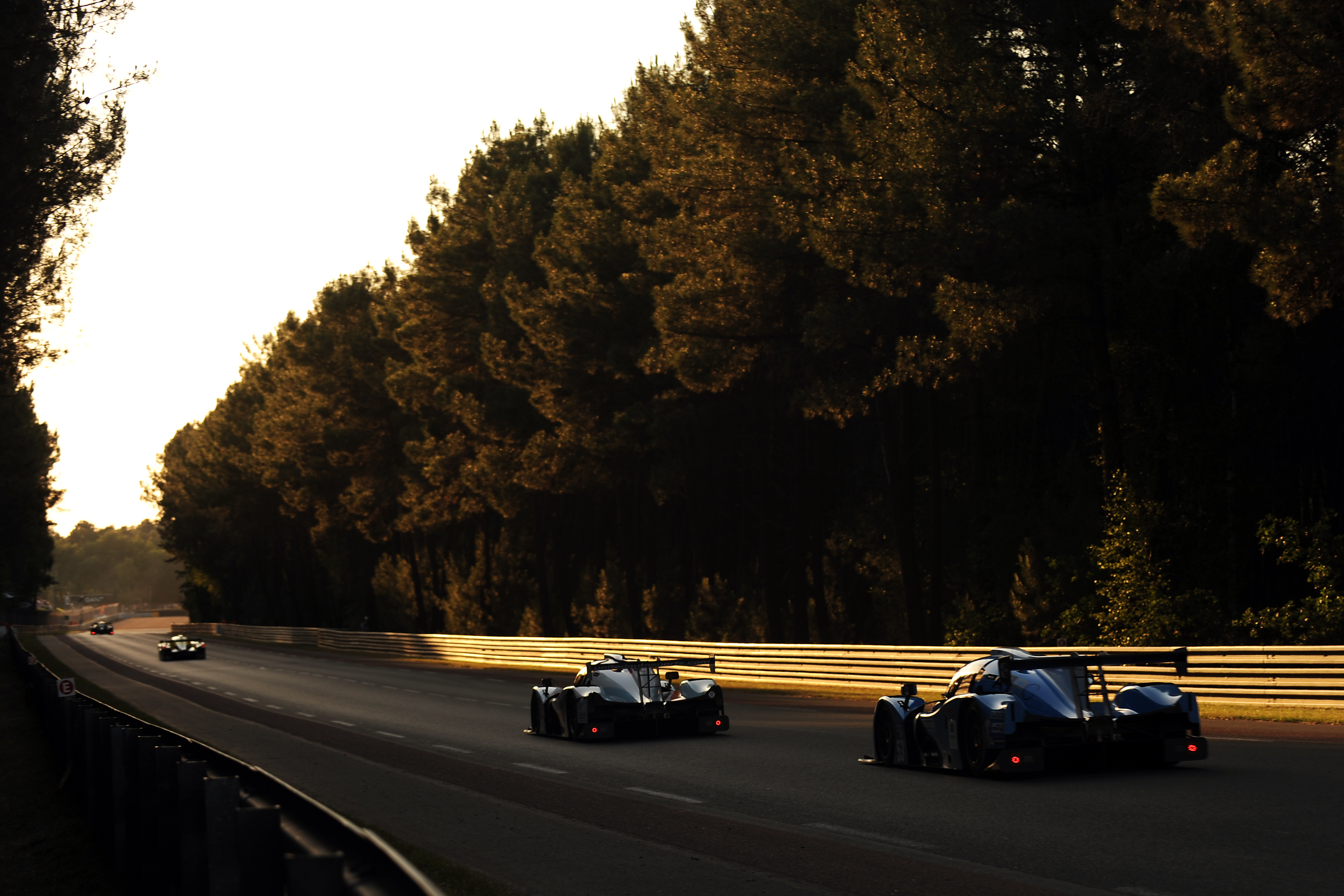 United Autosport lors des 24 Heures du Mans 2017.